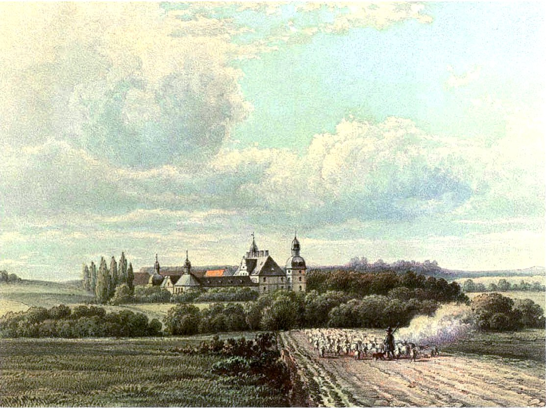 Schloss Eringerfeld, Lithografie aus dem 19. Jahrhundert